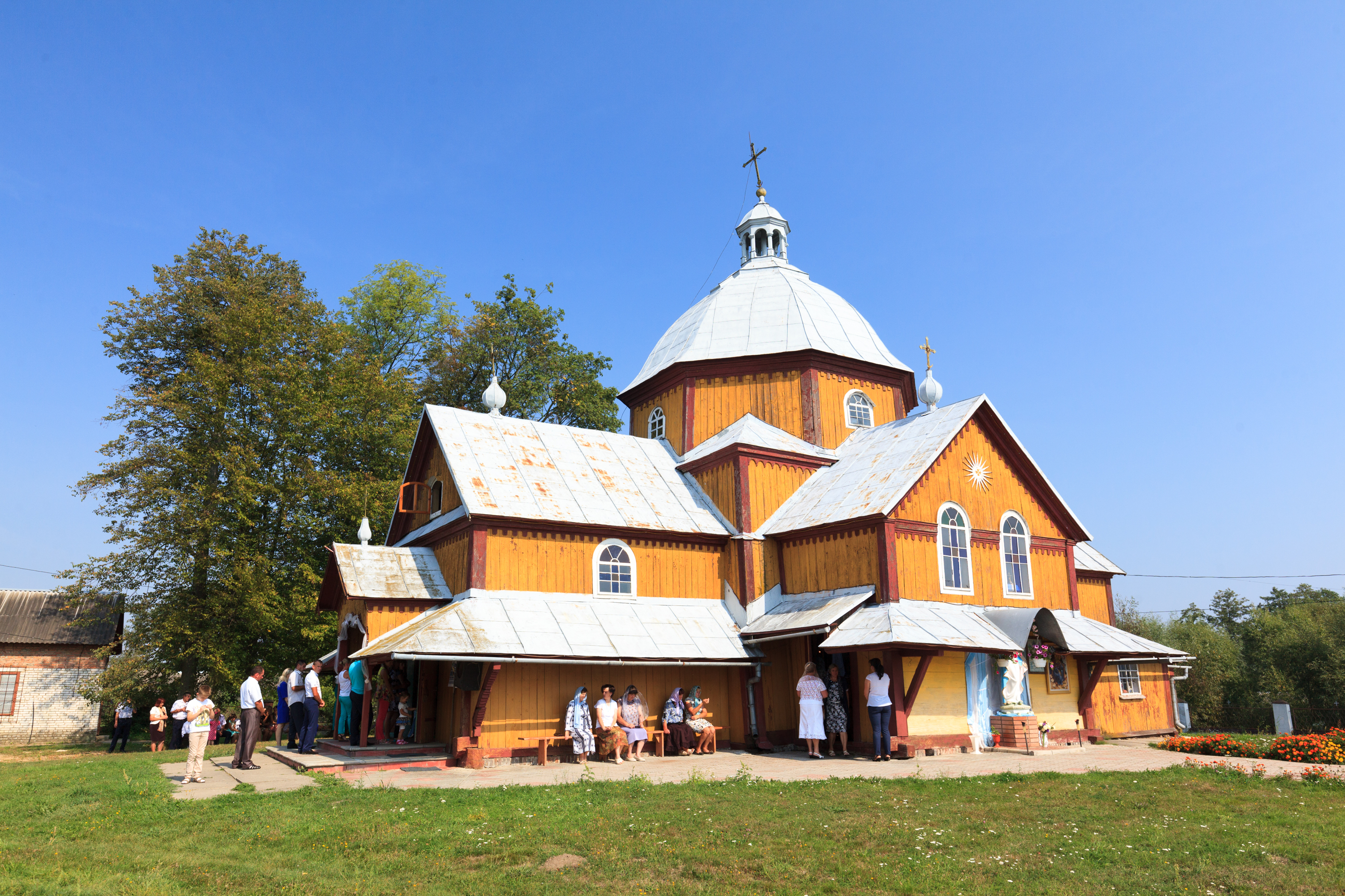 Церква Св.Іллі(дер.), с.Любині